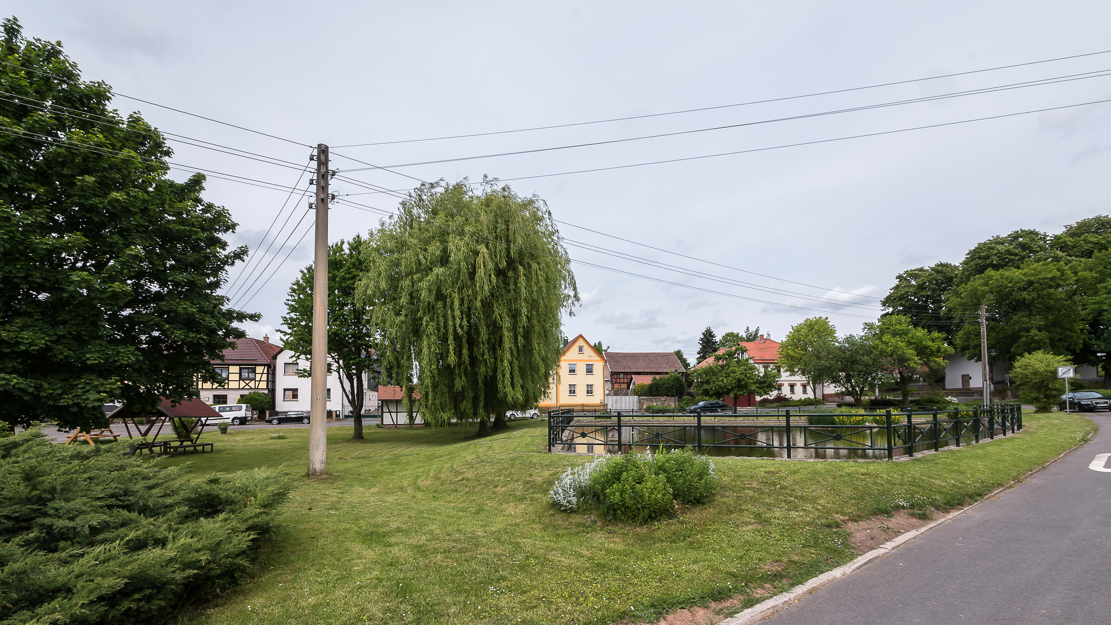 Schmorda Ortslage